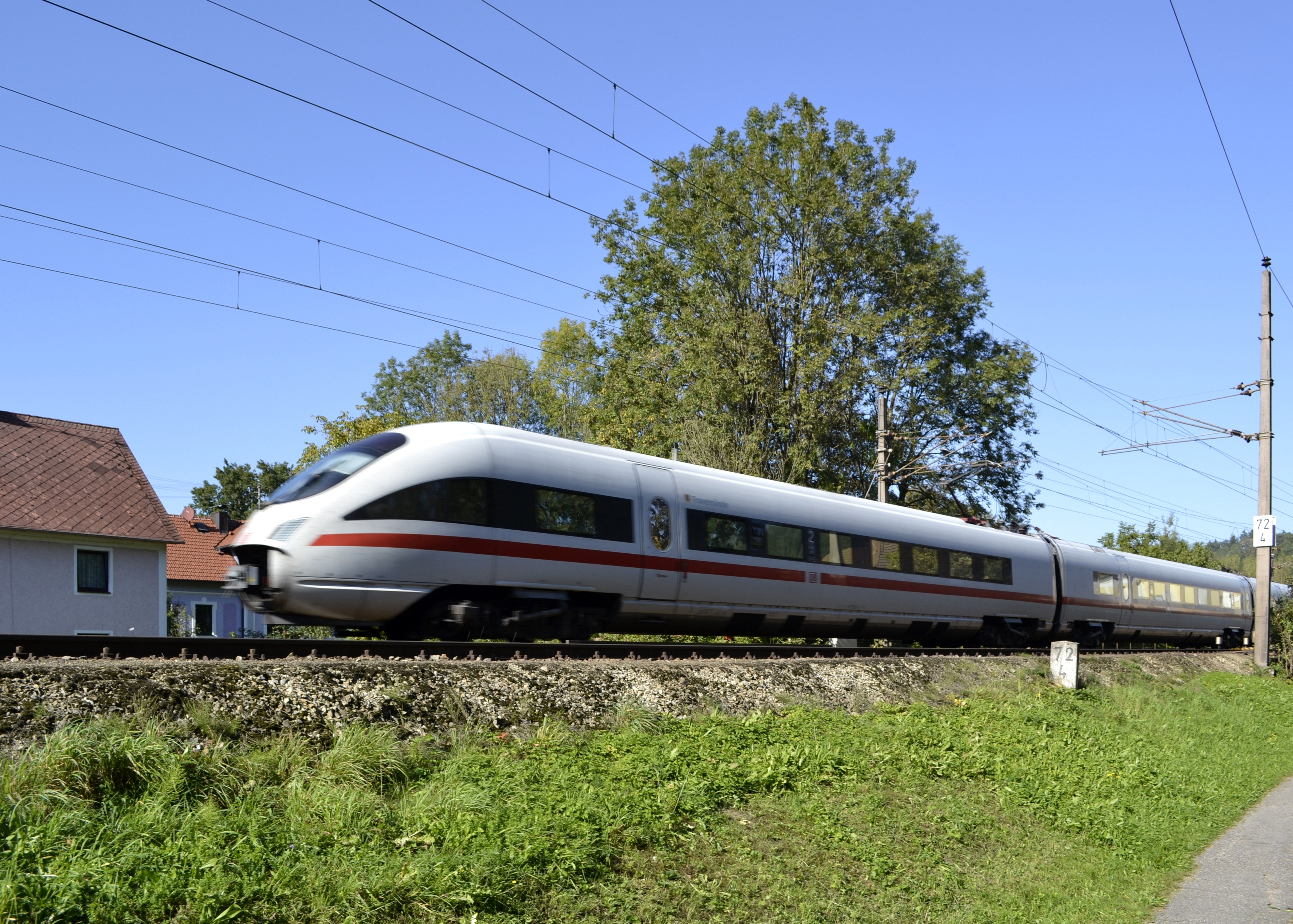 Ein ICE fährt durch Wernstein am Inn in Oberösterreich.